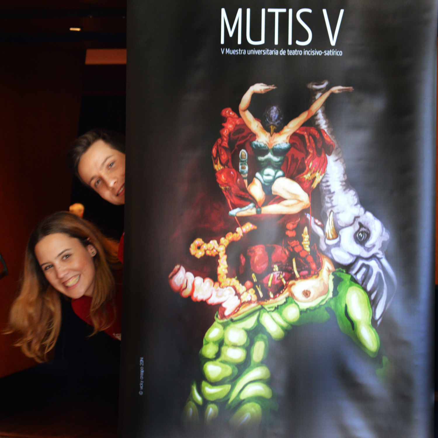 Voluntarios en el marco del V MUTIS en la UPC.